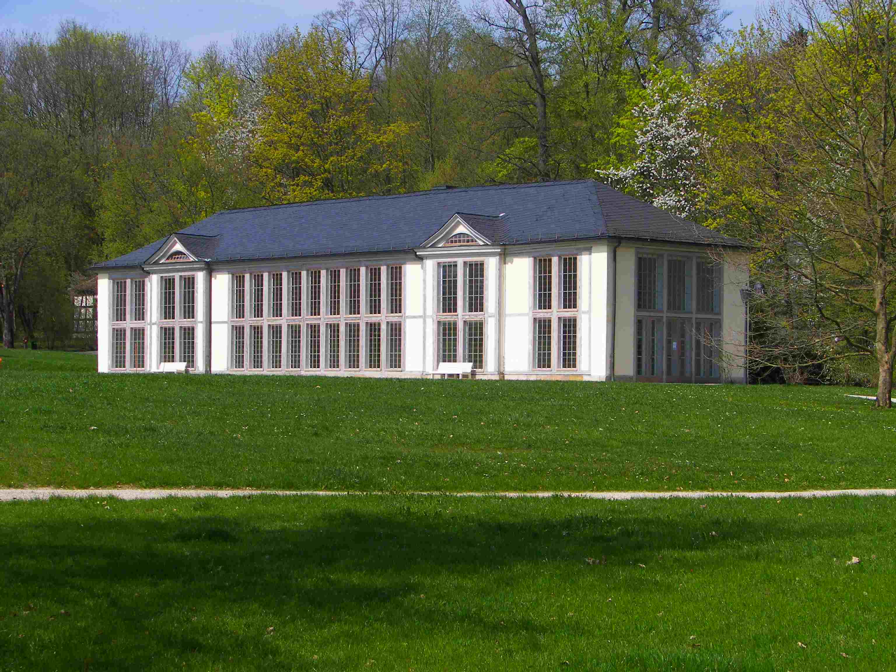 Schloss Rosenau, klassizistische Orangerie 1820 gebaut, die bis 1989 zur Überwinterung wertvoller exotischer Pflanzen wie Palmen und Zitruspflanzen genutzt wurde.